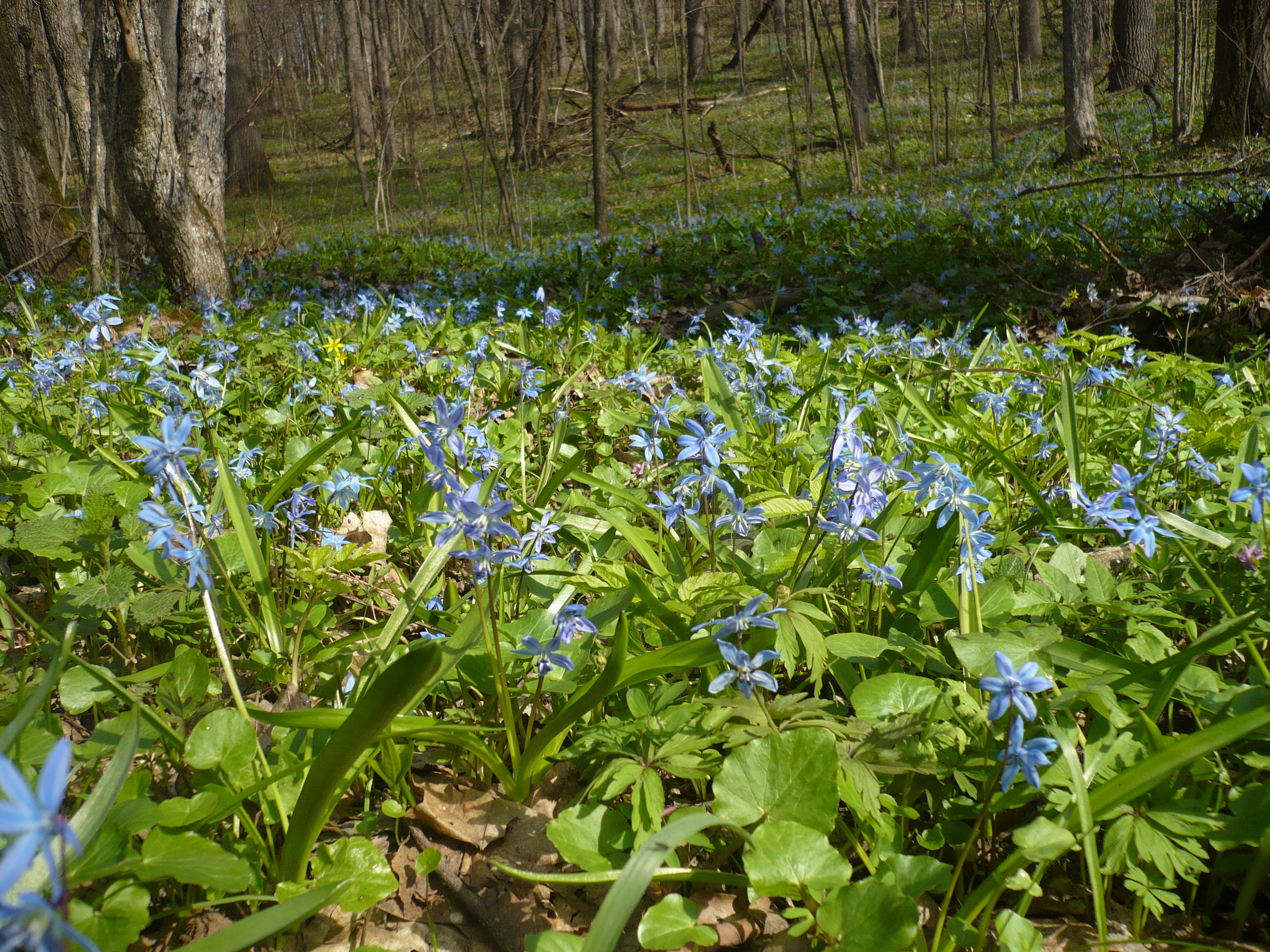 Пролеска сибирская (Othocallis siberica). Родовое экопоселение "Кореньские родники", Белгородская область.